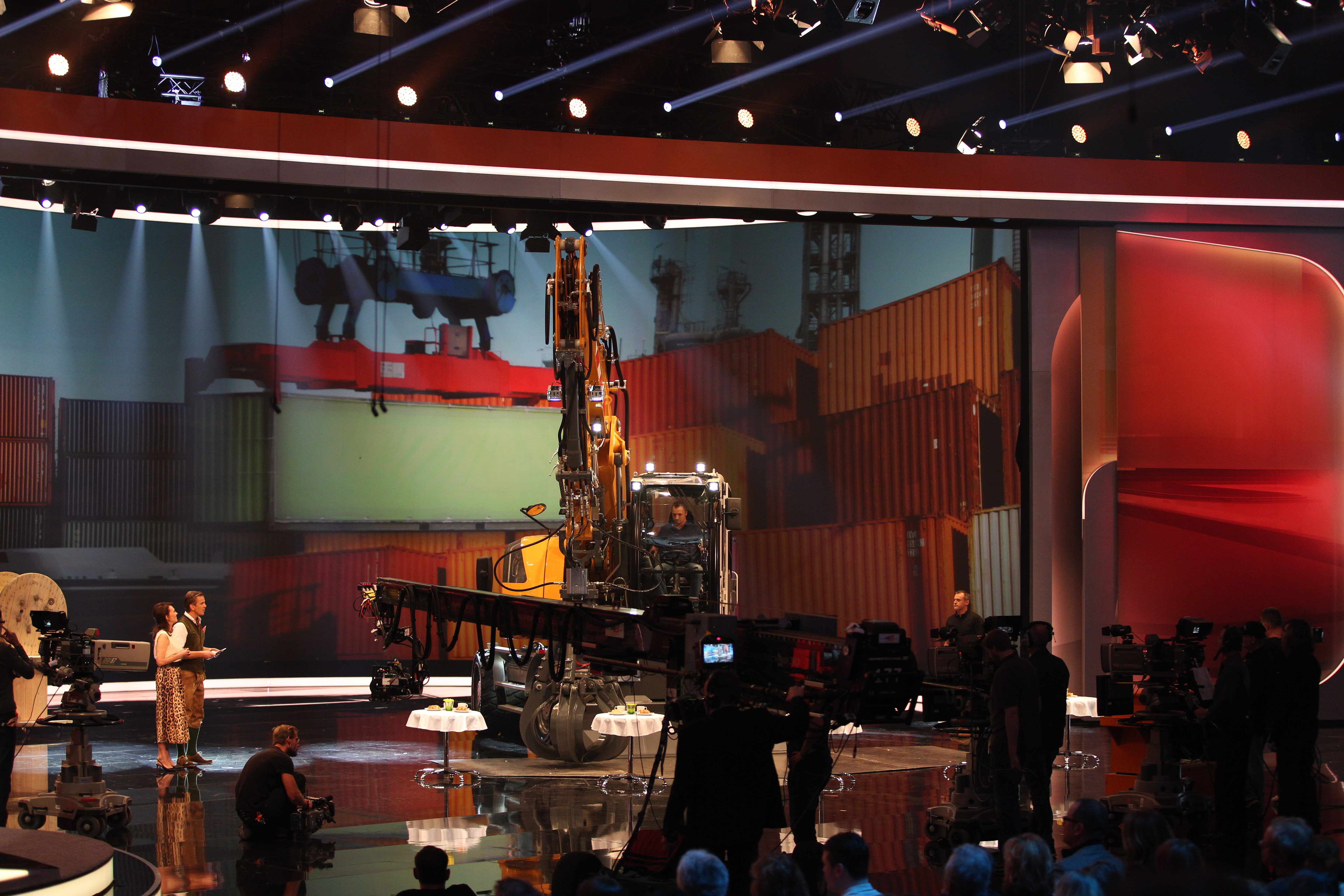 Wetten, dass.. ? 214. show in Graz, 8. Nov. 2014 Markus Lanz, Iris Berben at 214. Wetten, dass.. ? show in Graz, 8. Nov. 2014